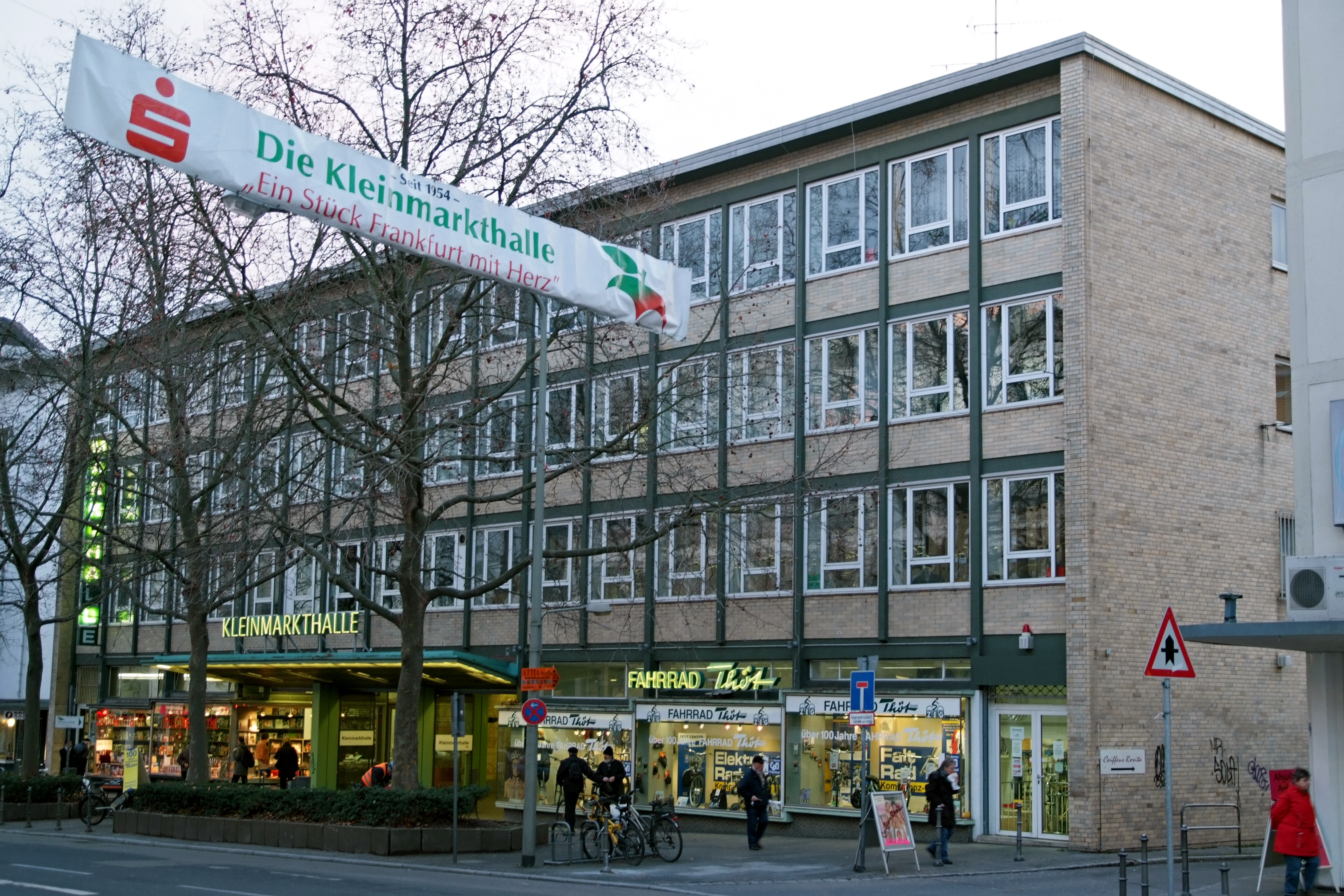 Kleinmarkthalle Frankfurt von Osten